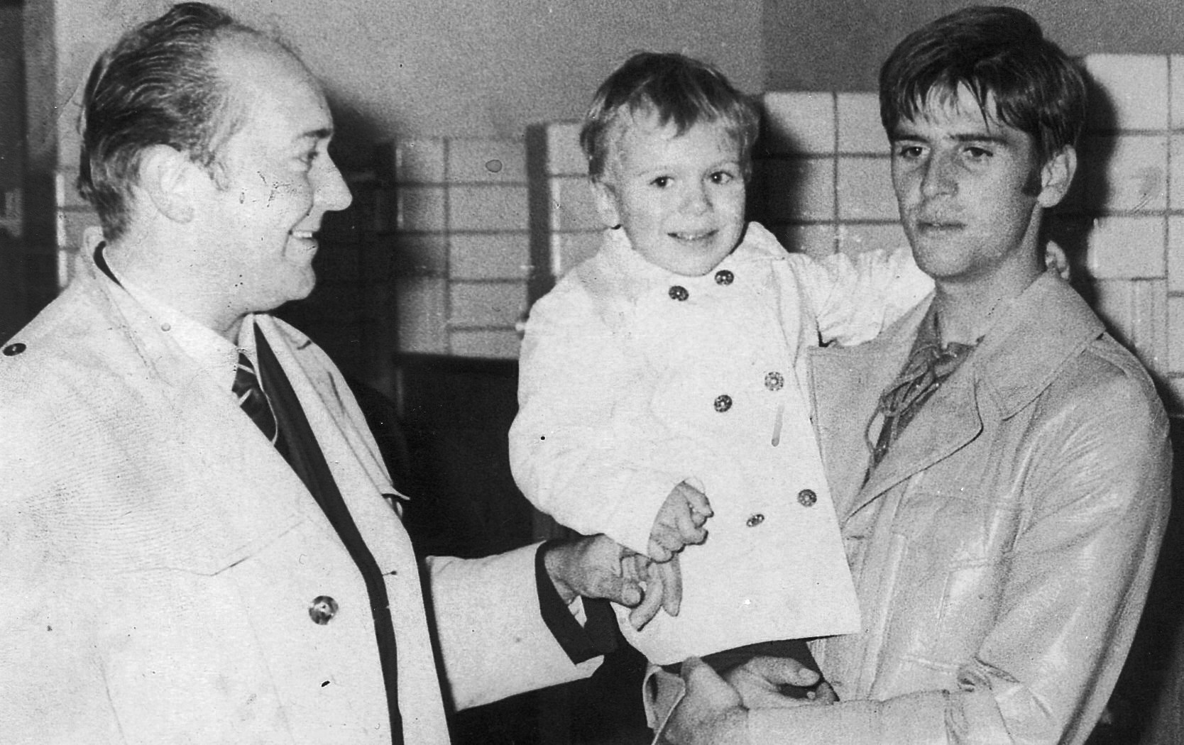 JP Monsere (rechts) in de kelder van 'Het Kuipke' in Gent, na zijn overwinning in de zesdaagse, in bijzijn van zijn sponsor.